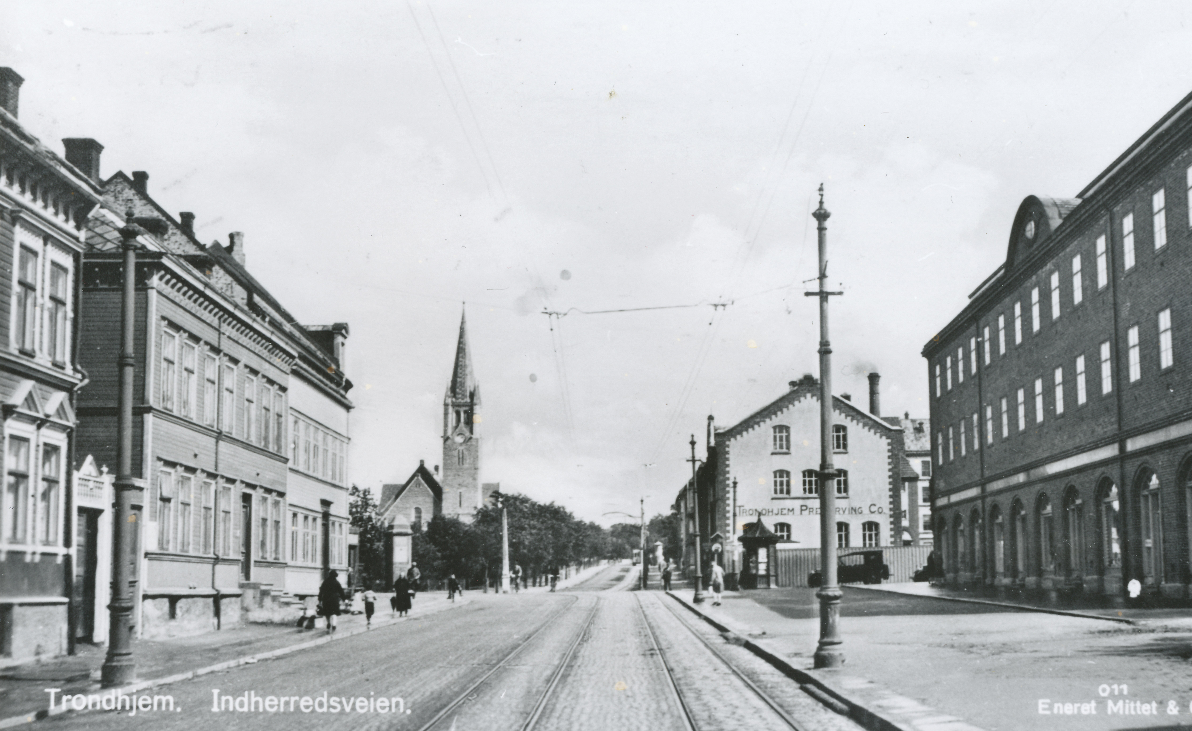 Innherredsveien med Lademoen kirke og Trondhjem Preserving, Innherredsveien 61. Bedriften flyttet til Østmarkveien 4 i 1987. Kiosker, Buran. Fotograf: Mittet & co. Fra et postkort, ukjent år.